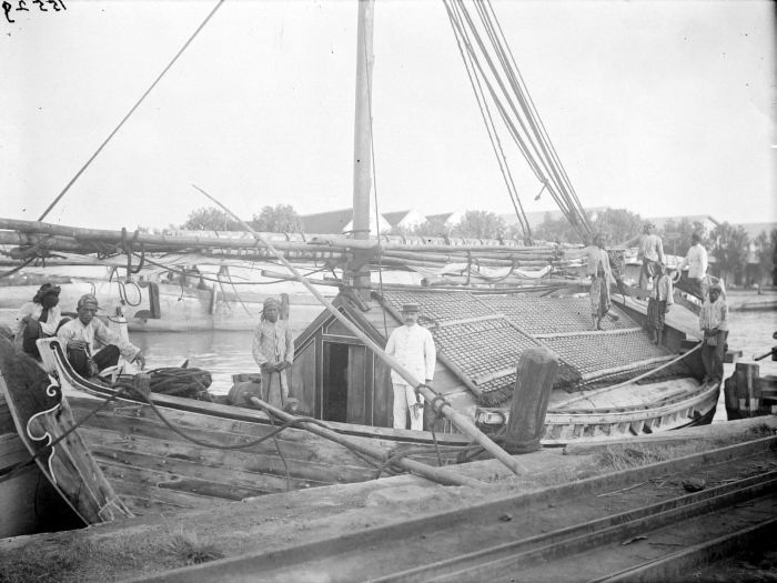 Negatief. Javanen en een Europeaan op plezierzeilschip in een haven in Java